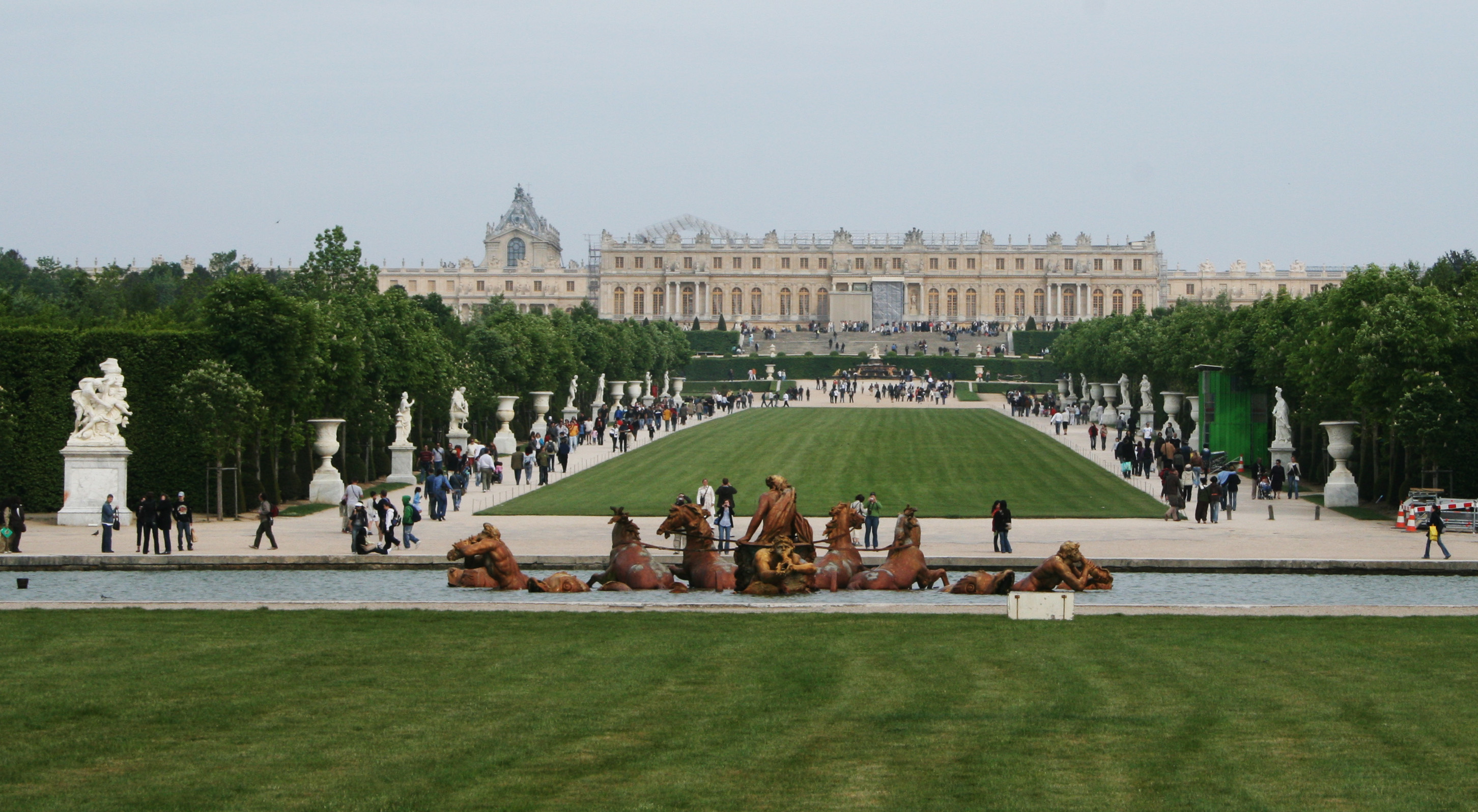 Allée Royale dite aussi Tapis Vert dans les jardins du Château de Versailles et facade ouest du château.